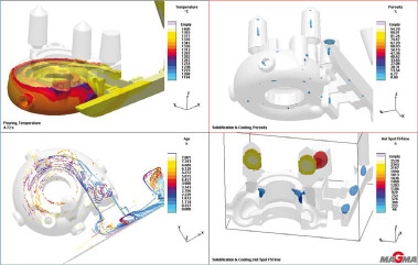 Eine leistungsfähige Software zur Simulation von Gießprozessen bietet Möglichkeiten zur interaktiven oder automatisierten Auswertung von Ergebnissen (hier beispielsweise zu Formfüllung und Erstarrung, Porositäten und Strömungsverhalten).